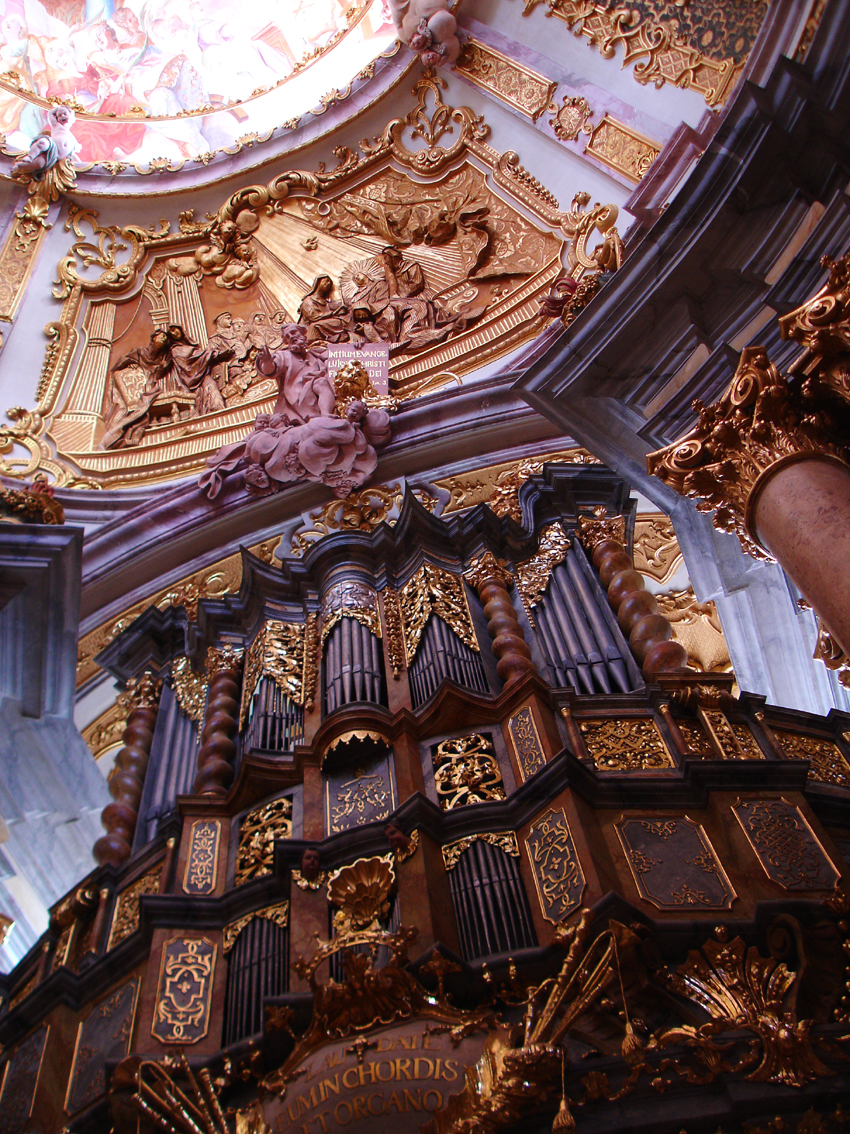 Weltenburg abbey